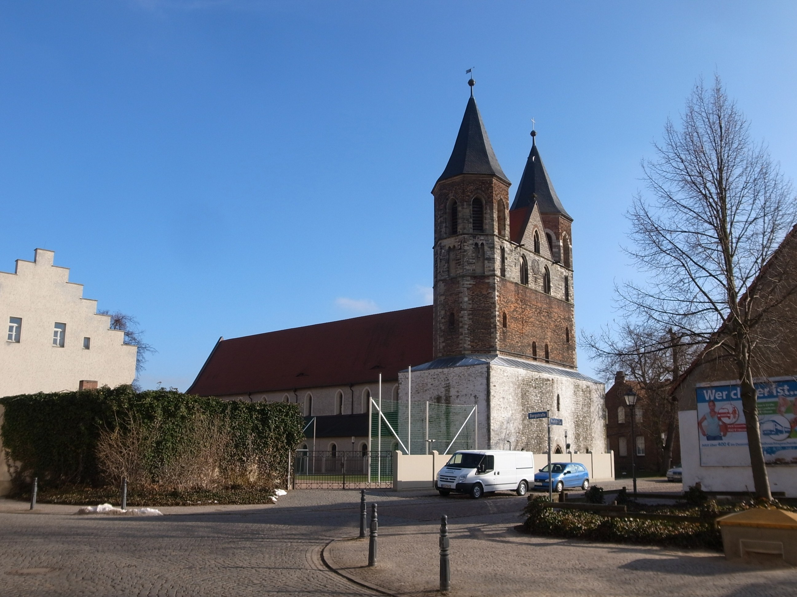 Aken (Elbe), Marienkirche